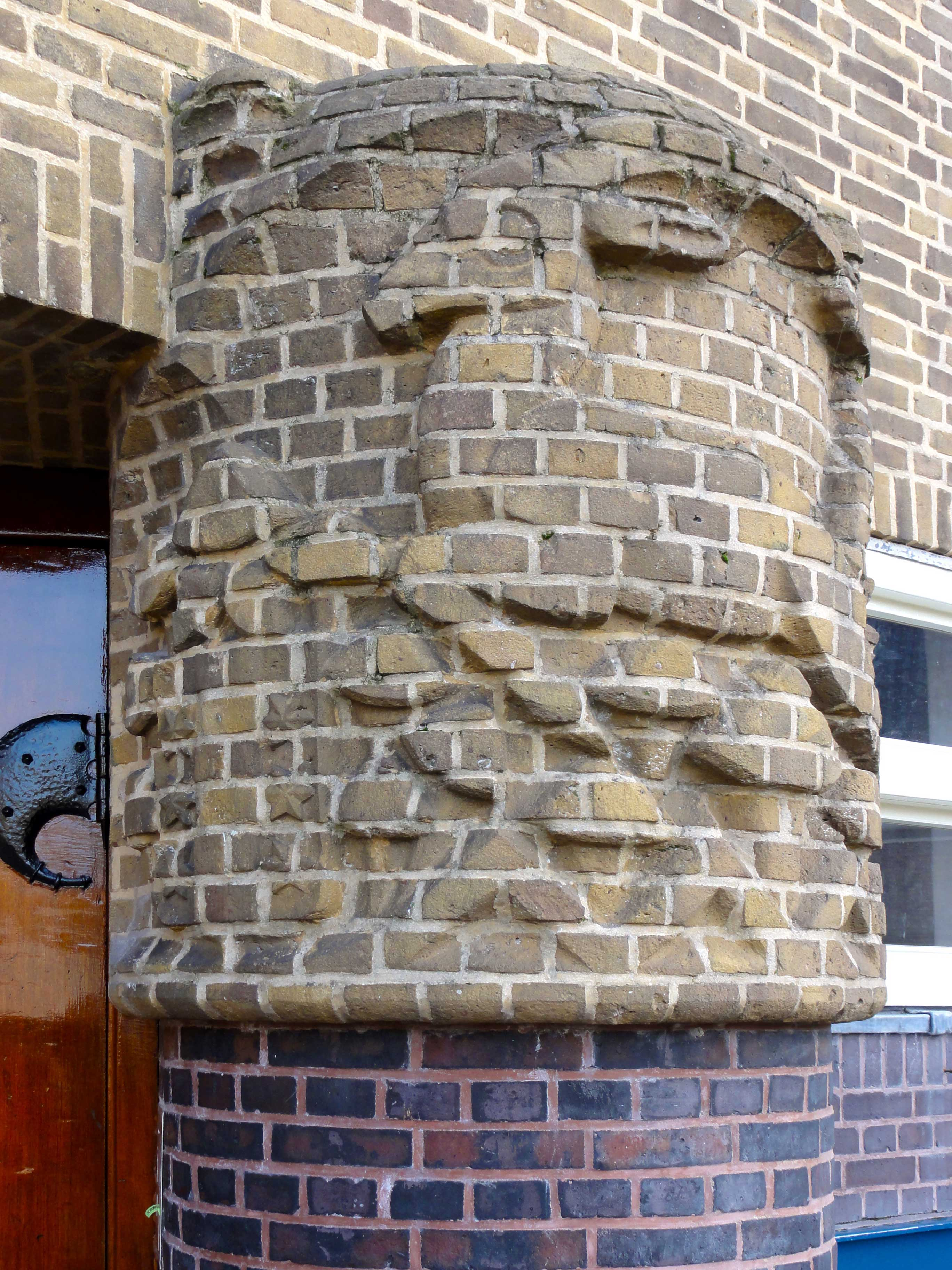 Reliëf (steenbok met het Goudse wapen) in de muur van de het voormalige schoolgebouw: de openbare lagere school nr. 2, vanaf 1947 Goeman Borgesiusschool en vanaf 1975 Kadeschool genoemd, anno 2011 "De Goudse praktijk", een centrum voor gezondheidszorg